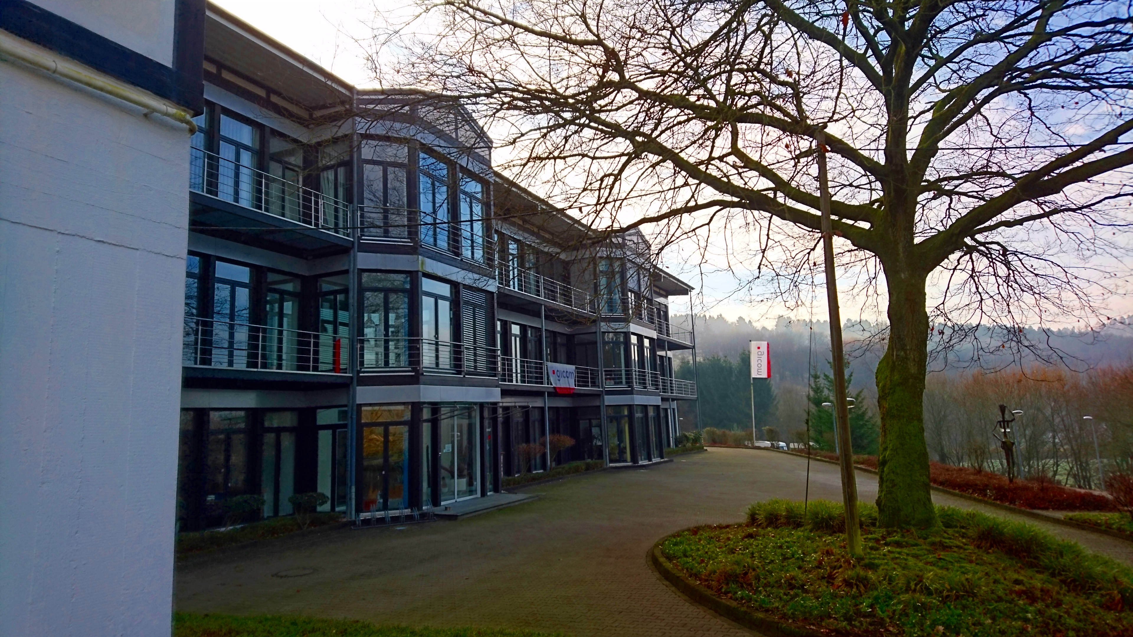 Ansicht Brodhausen (Overath), modernes Bürogebäude